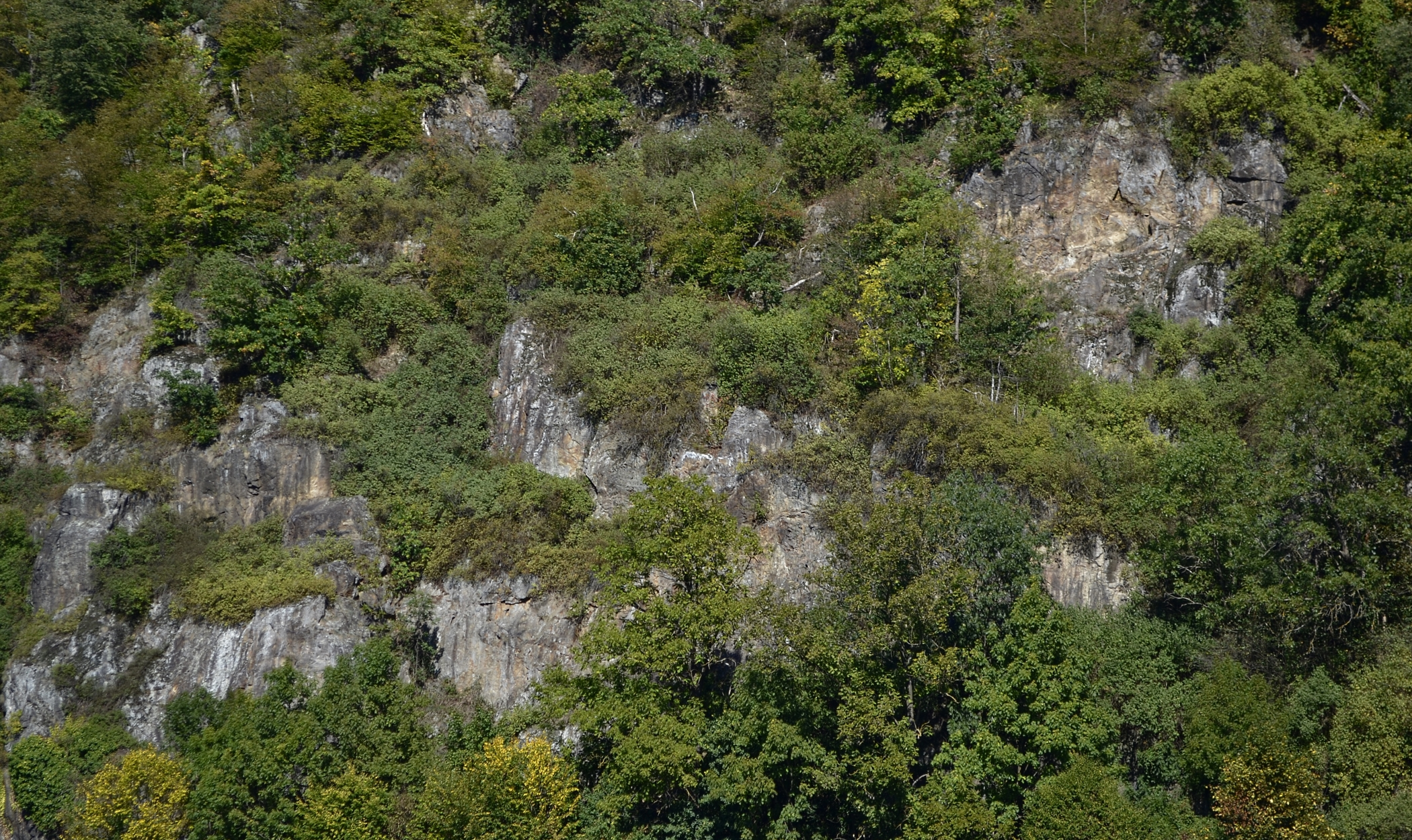 Das anstehende Perlgneis-Gestein am Georgsberg in Passau. An den Oberhausleiten zeichnet sich eine Abfolge von offenem Fels, Trockengebüsch und geschlossenem Mischwald ab. Der freigelegte Fels zeigt Gneise, die während der Auffaltung des Moldanubikum-Grundgebirges entstanden sind. Diese silikatischen Plutonite und Metamorphite zeigen im Gegensatz zu Graniten Schicht- und Streifenstrukturen.